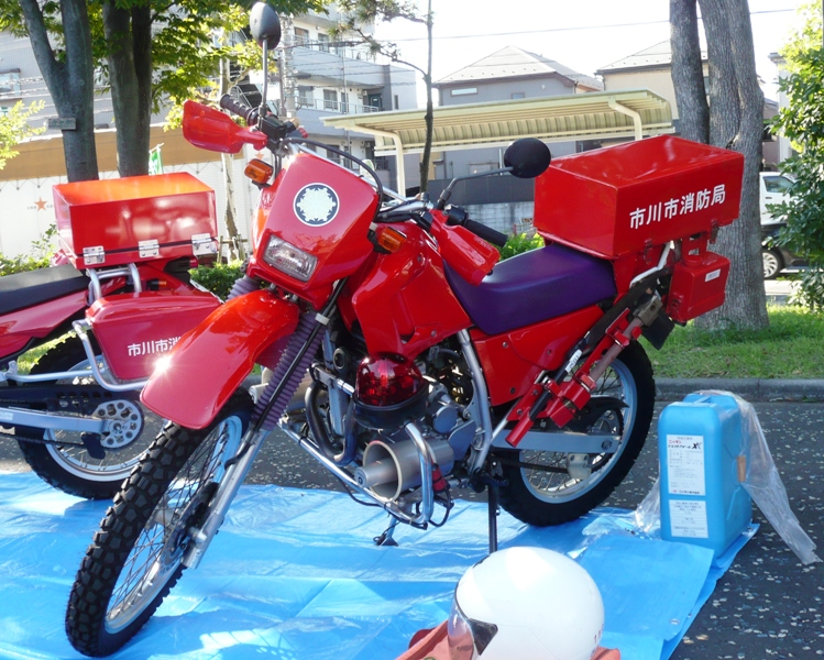 市川市消防局の赤バイ。